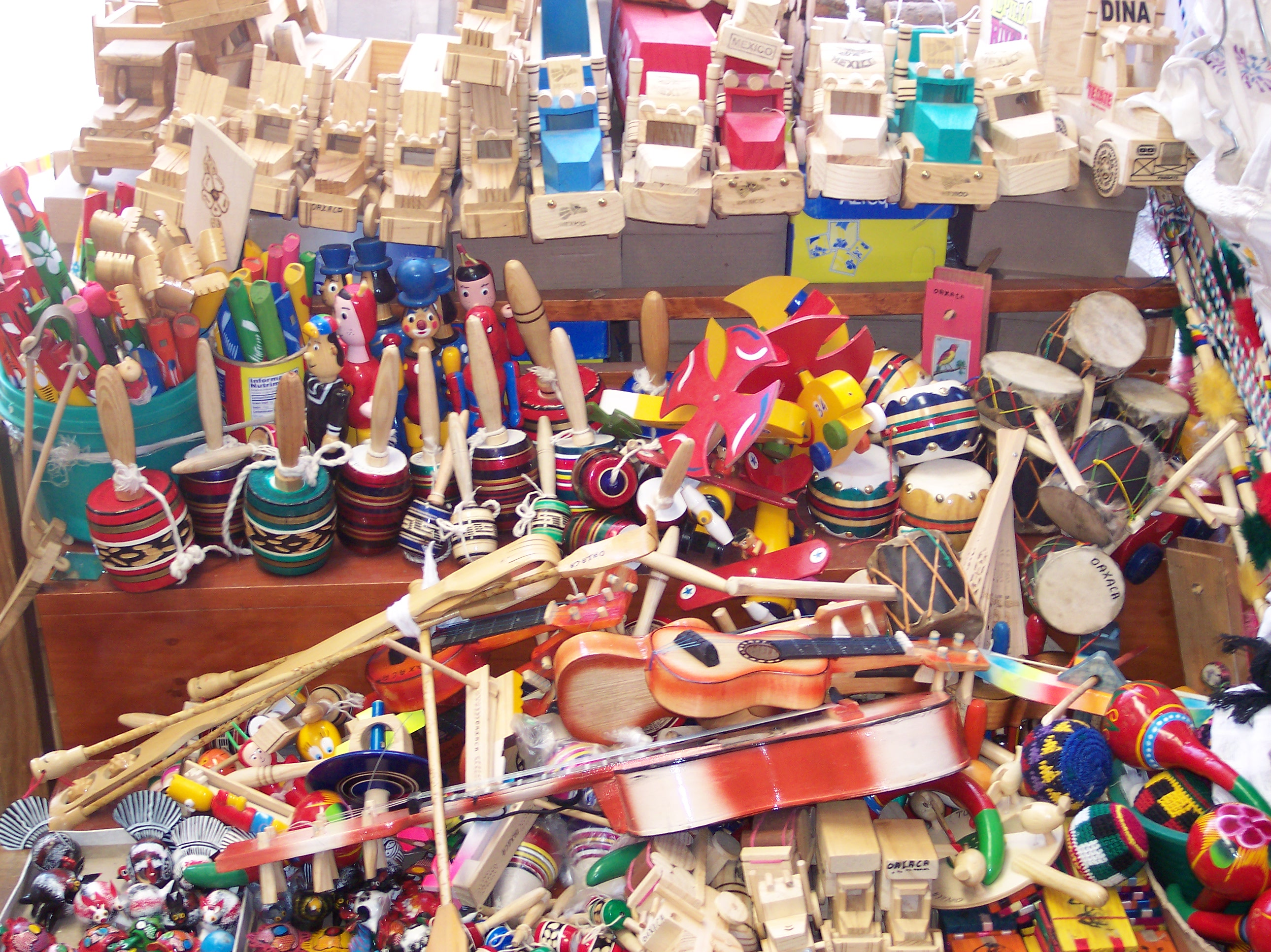 Mexican toys. Located in: Santa María del Tule, Oaxaca, Mexico.